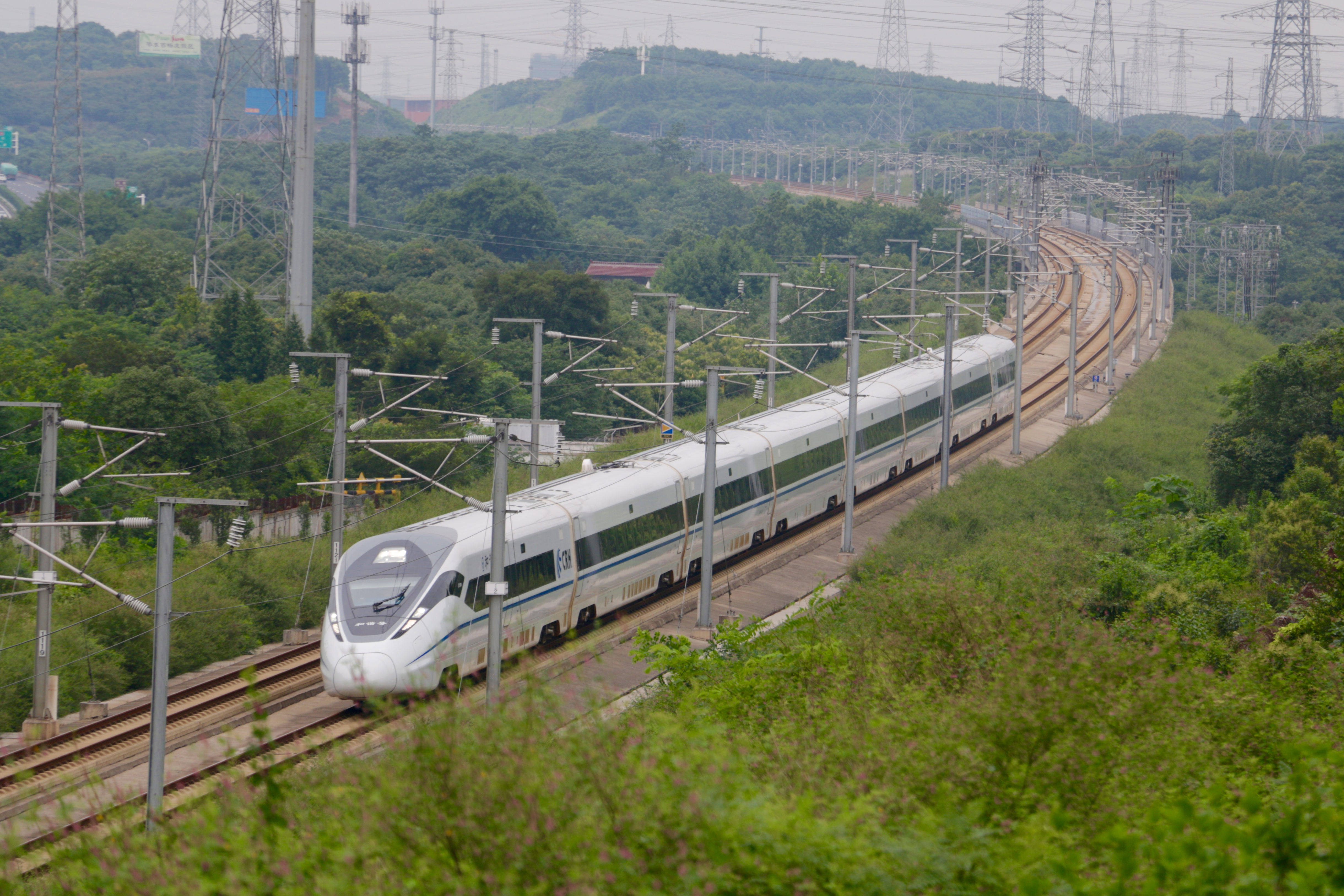 中文（中国大陆）: CRH380D于宁杭高速铁路